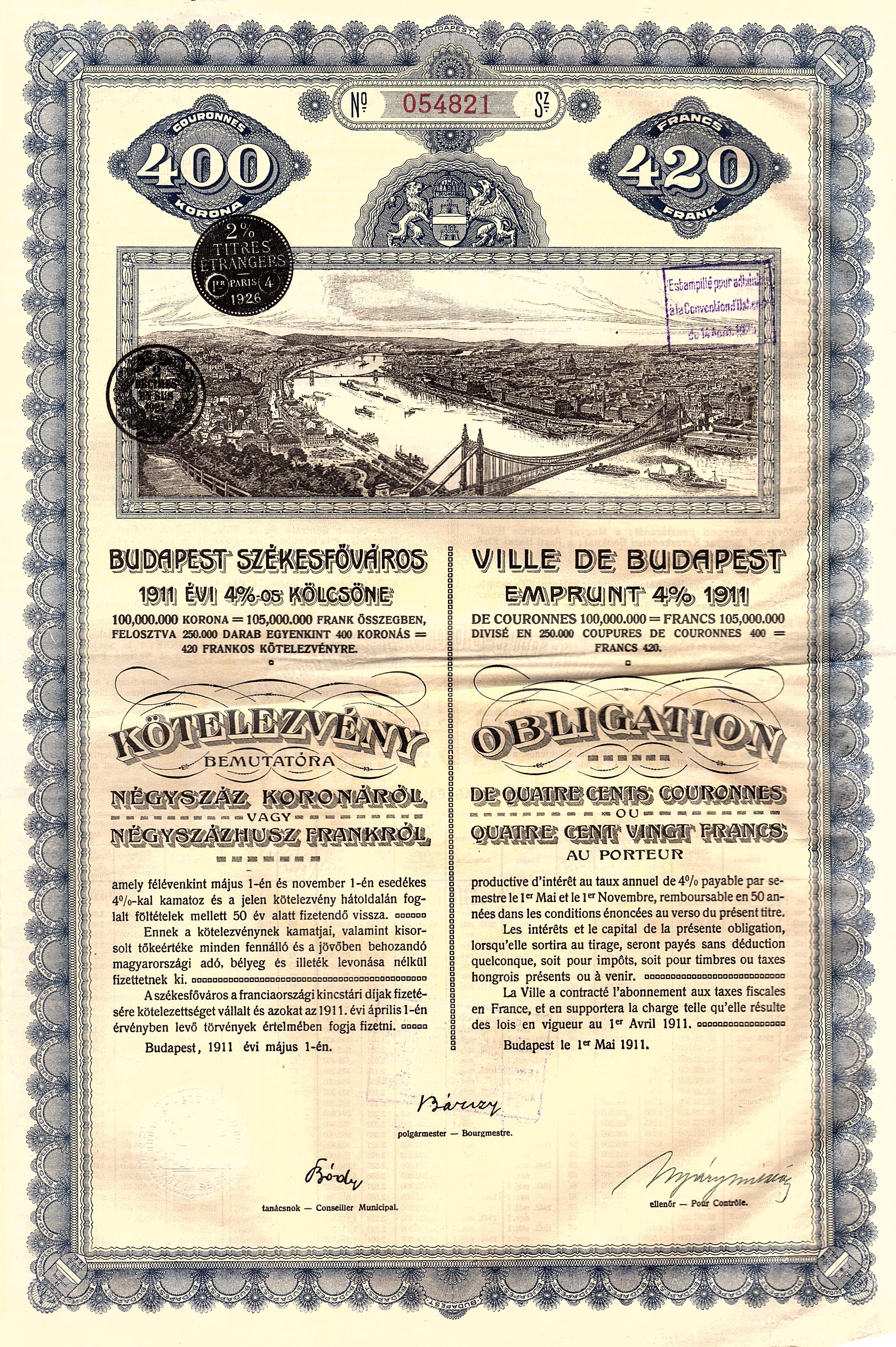 Obligation über 400 Kronen der Stadt Budapest vom 1. Mai 1911